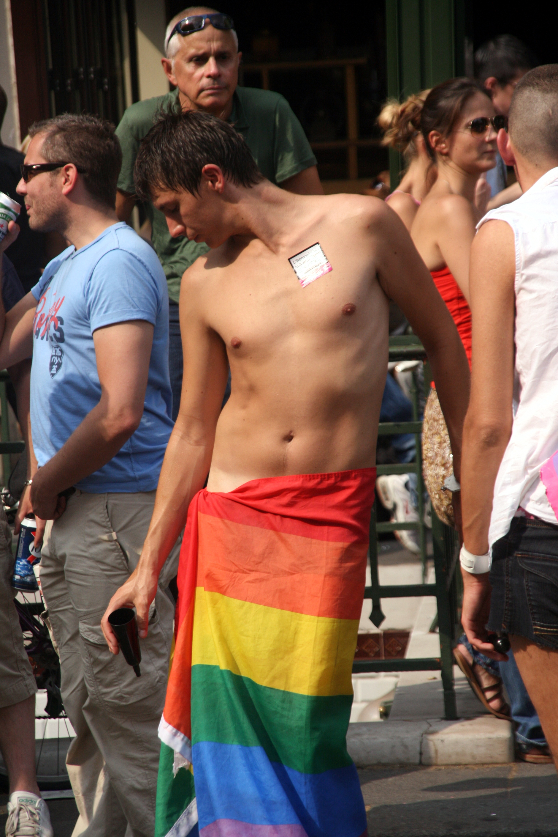 Paris Gay Pride 2010